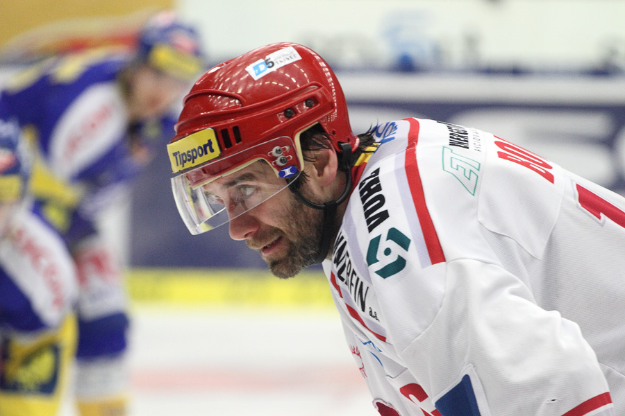 Česky: Radek Bonk při předkole play-off Zlín-Třinec české extraligy v sezoně 2011/2012